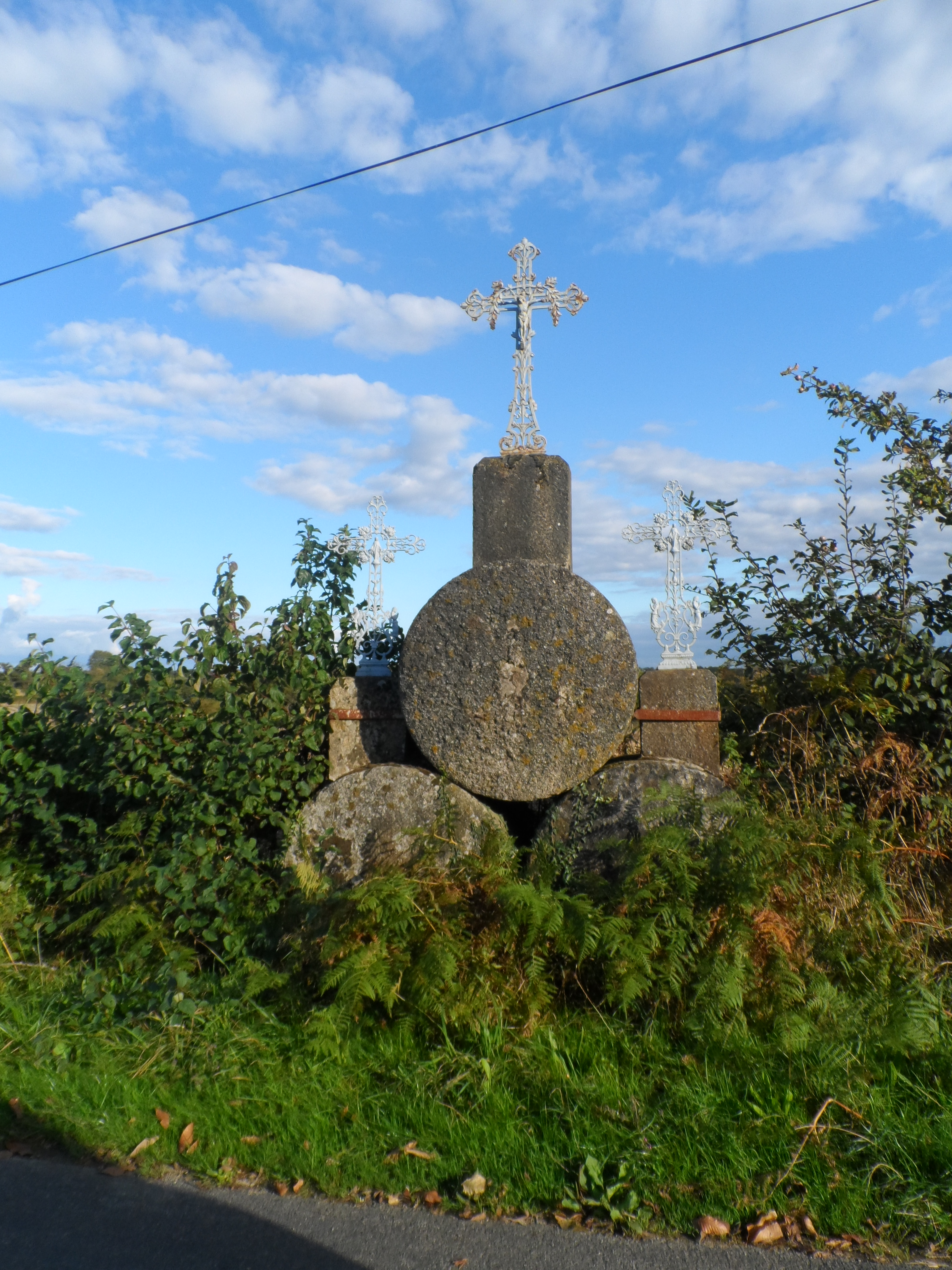 Calvaire du Beugnon